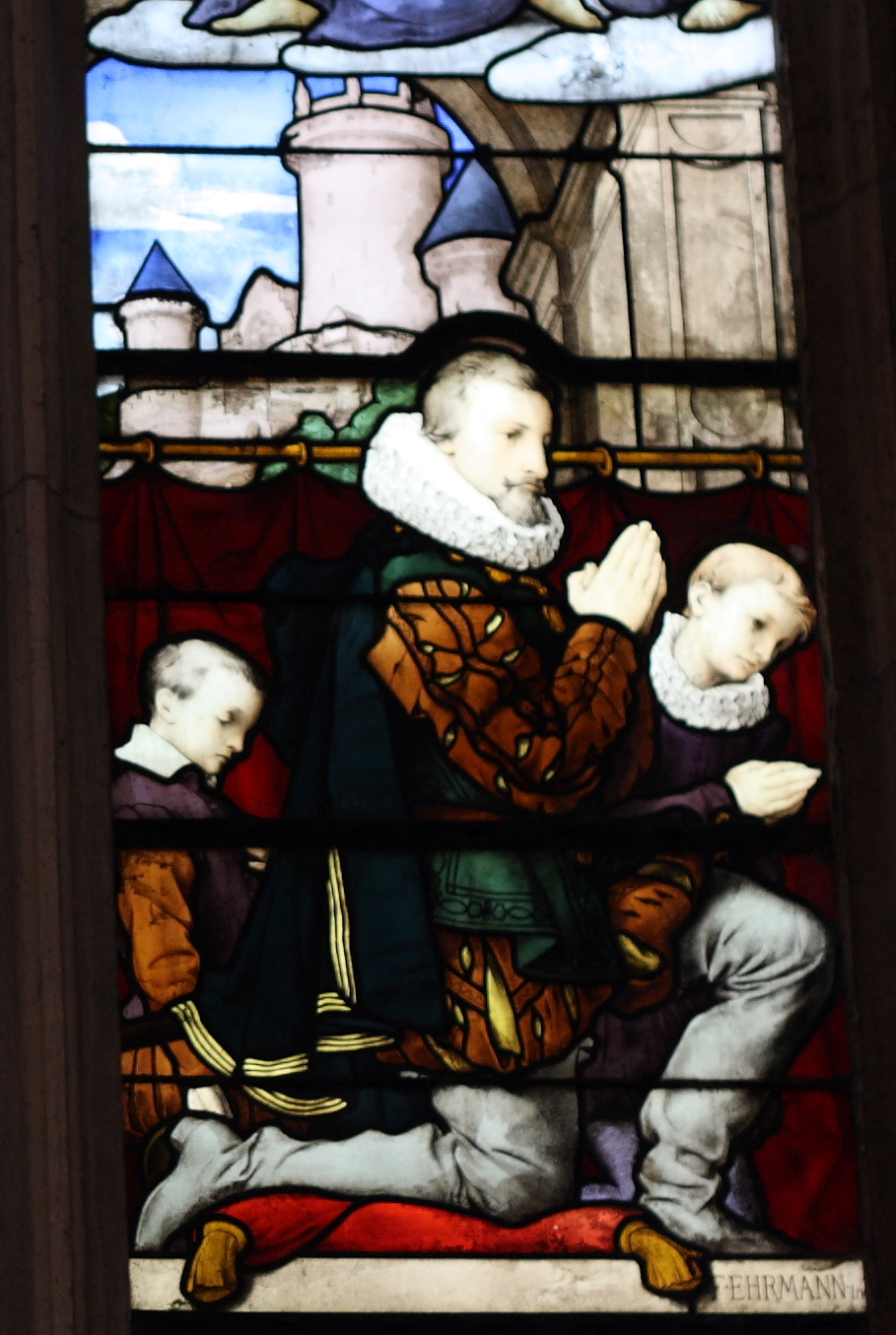 Ausschnitt eines Bleiglasfensters (19. Jahrhundert) in der katholischen Pfarrkirche Saint-Martin (Collégiale Saint-Martin) in Montmorency, Darstellung: Louis III de La Trémoille mit zwei Söhnen, Karton: Charles Leprévost, Ausführung: François Emile Ehrmann (siehe: Dominique Foussard, Charles Huet, Mathieu Lours: Églises du Val-d'Oise. Pays de France, Vallée de Montmorency, Société d'Histoire et d'Archéologie de Gonesse et du Pays de France, 2. Auflage, Gonesse 2011, ISBN 9782953155426)